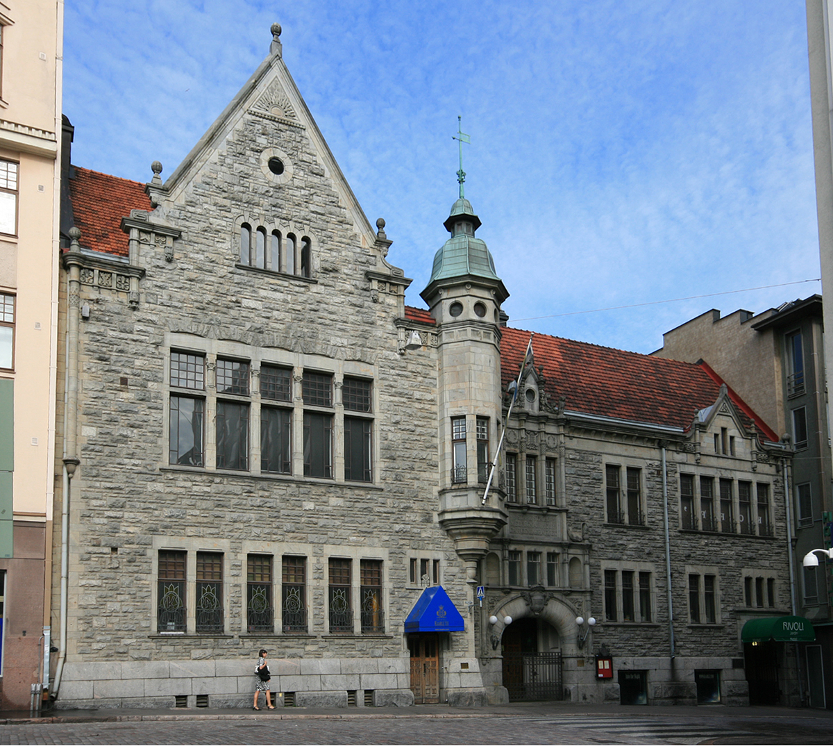 Nylands Nation, Kasarmikatu 40, Helsinki. Arkkitehti: Karl Hård af Segerstadt. Rakennusvuosi: 1901